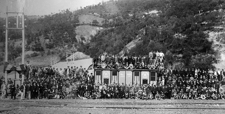 El 4 de agosto de 1907 se festejó en Beasain la construcción del vagón Nº 1.000 de la producción de la fábrica de vagones. Fotografía de Pablo Weeber. Archivo EuskoTren/Museo Vasco del Ferrocarril